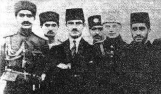 ماژور مسعود خان در کنار سردار سپه و سید ضیاء